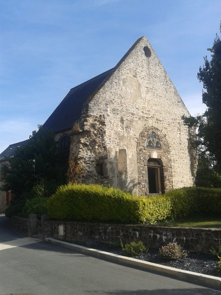 Chapelle Saint-Martin de Montsûrs (Inscrit) .